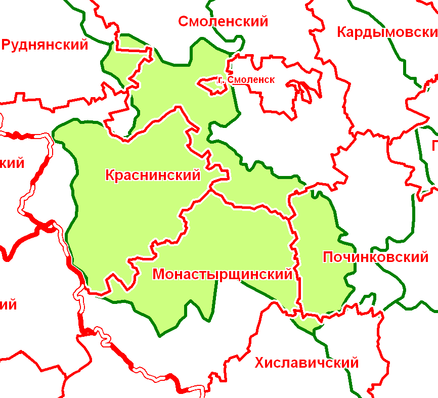 Краснинский уезд Смоленской губернии в современной сетке районов